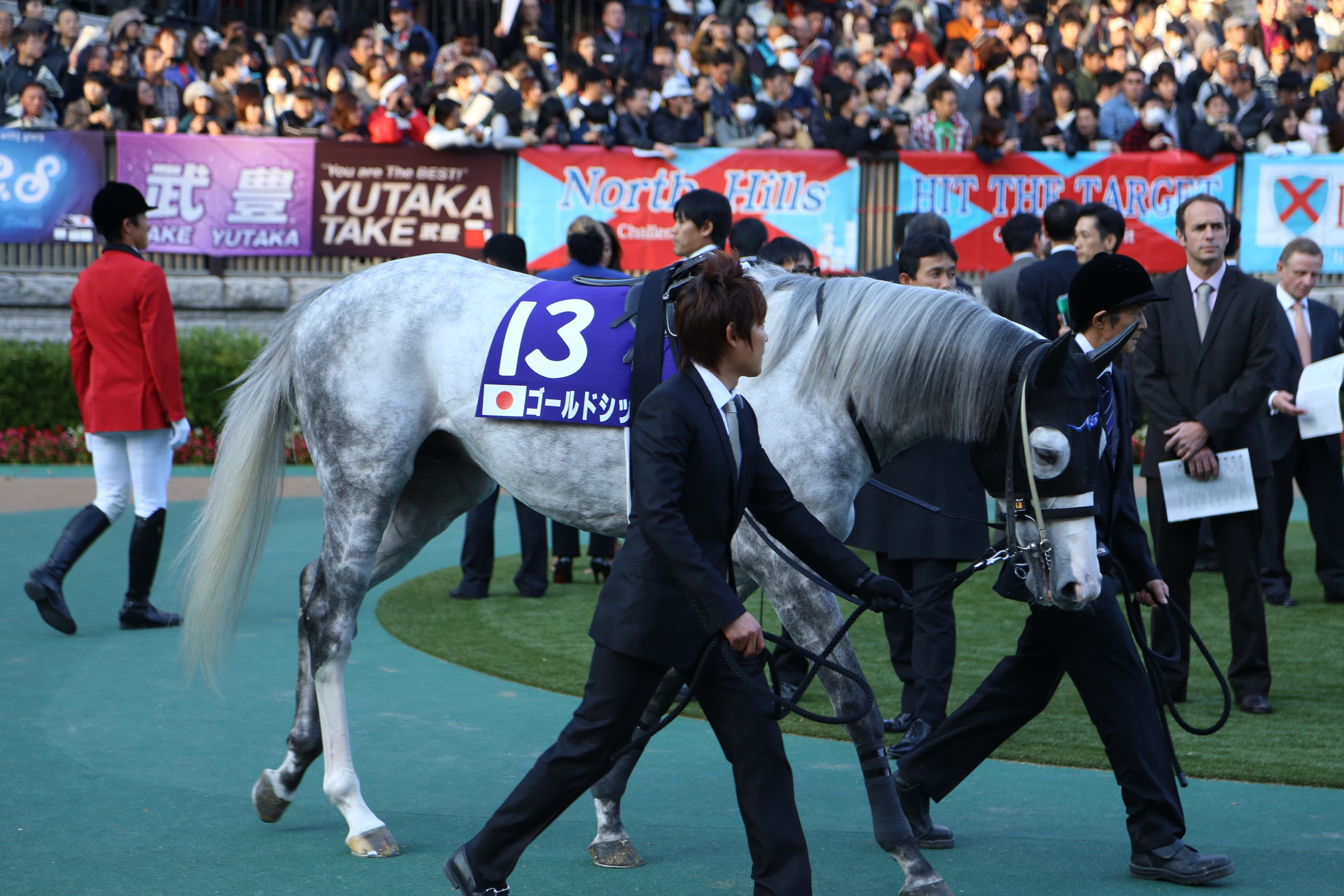 2013年ジャパンカップでのゴールドシップ